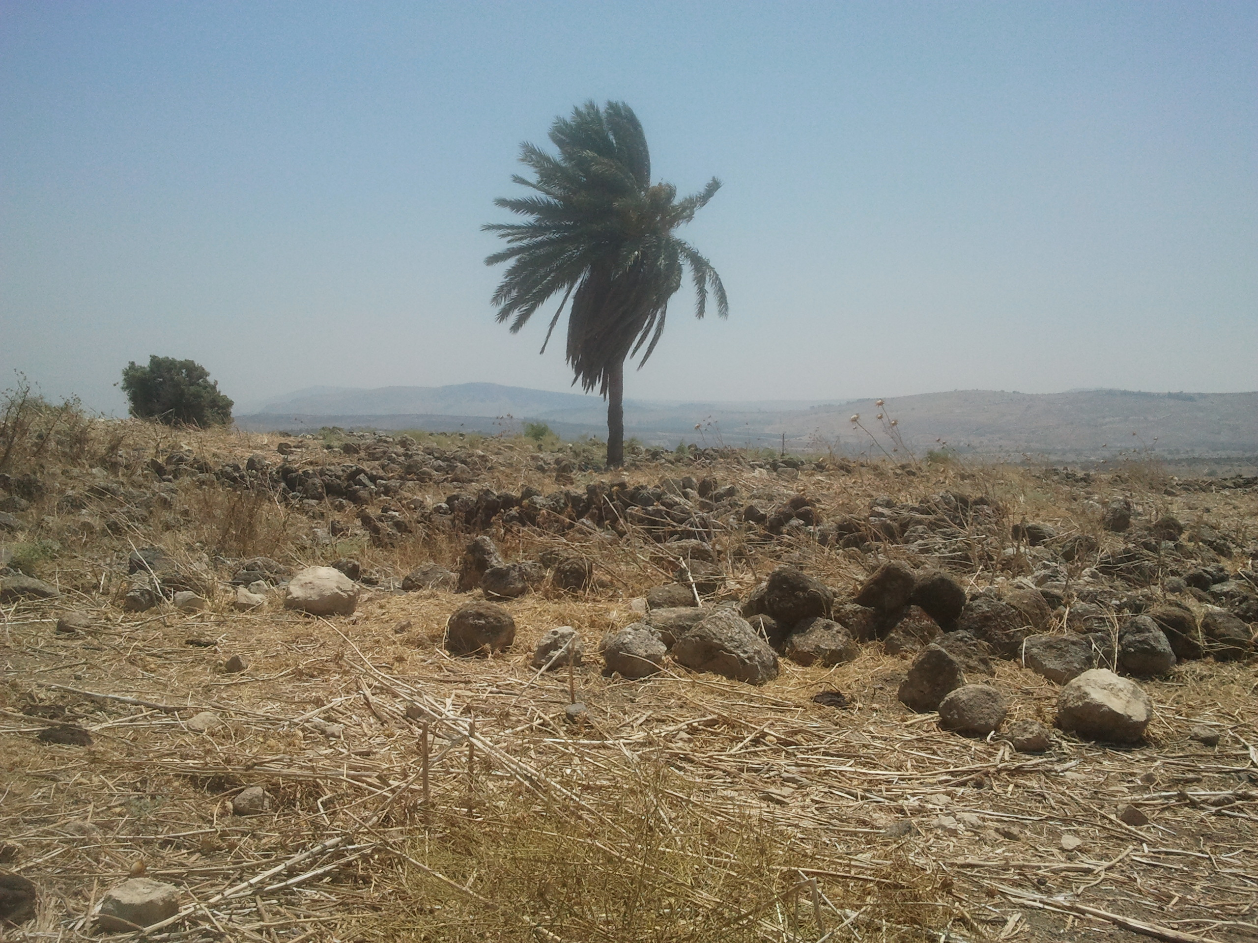 שרידי היישוב היהודי העתיק חוקוק שהיה כפר יהודי בימי המשנה והתלמוד. על שליש משטחו שכן לאחר מכן הכפר הערבי יאקוק